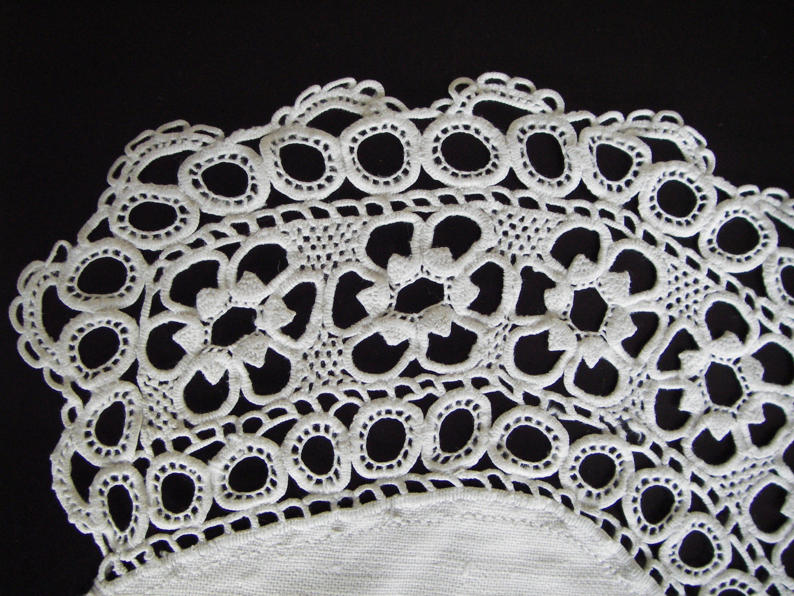 Hedebosyning fra perioden ca. 1855